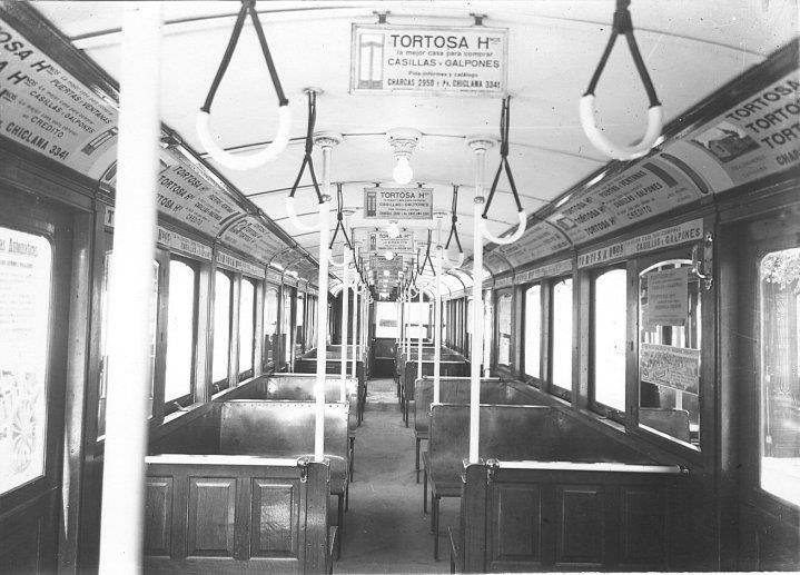 Interior de coche La Brugeoise